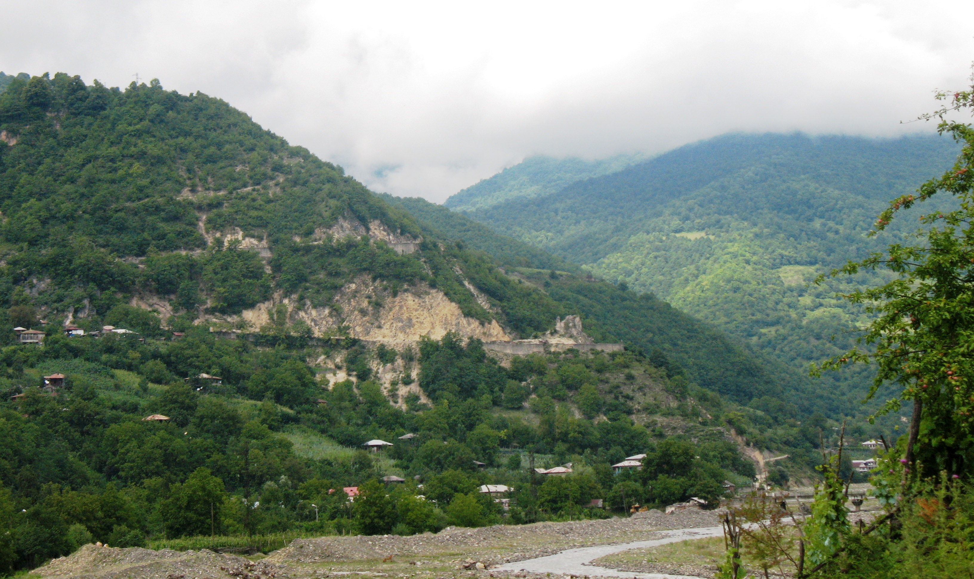 view to vil.Orbeli.